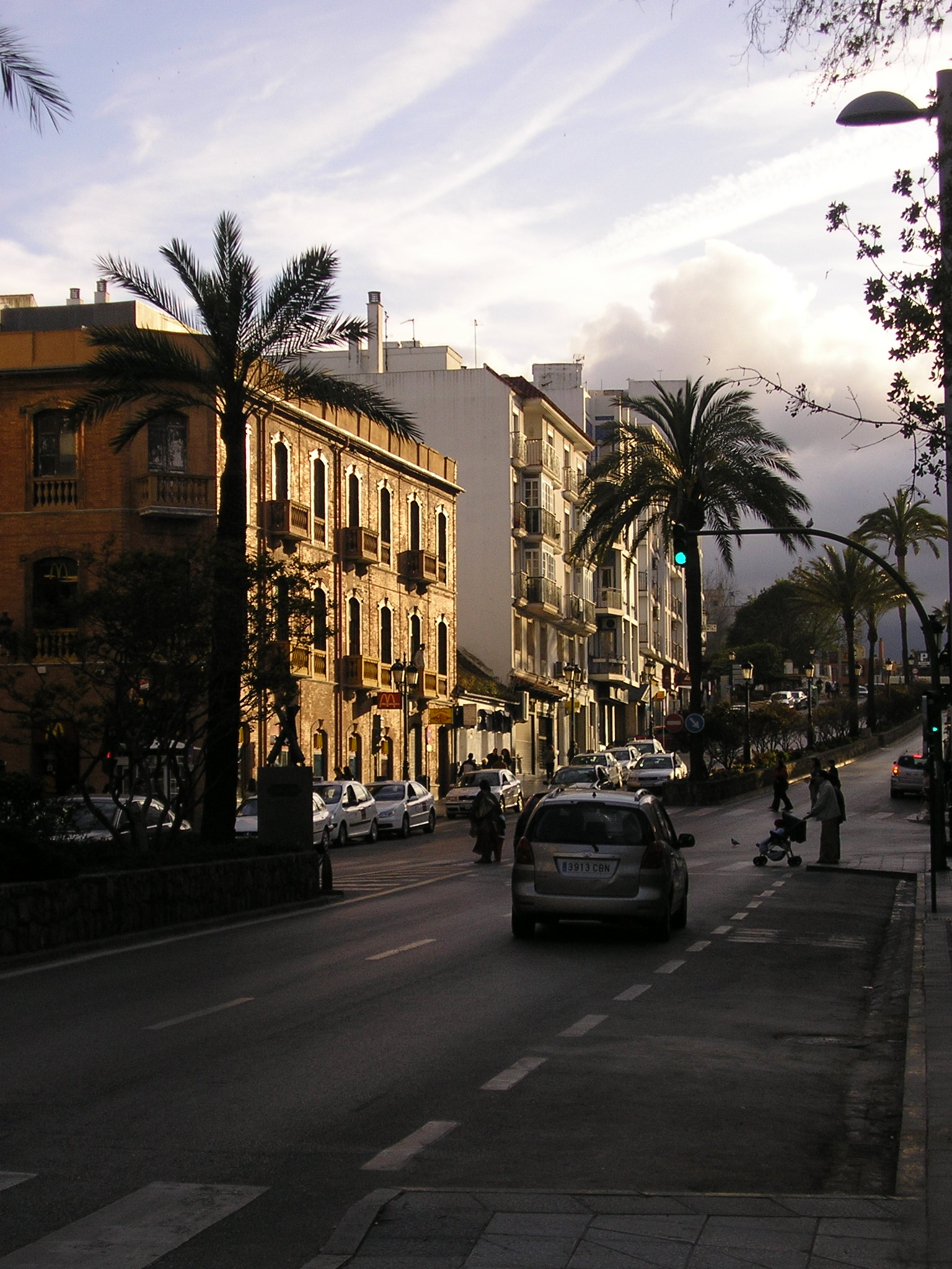 Avenida Blas Infante de Algeciras, Andalucía, España